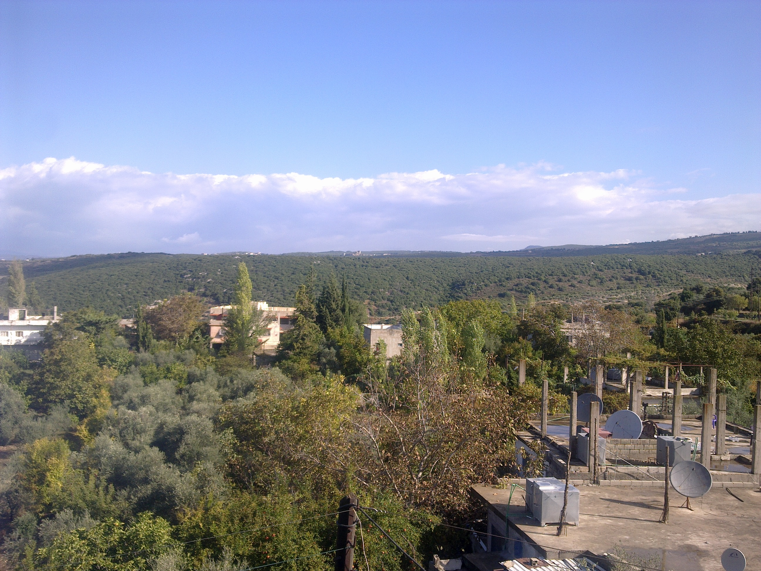 ج